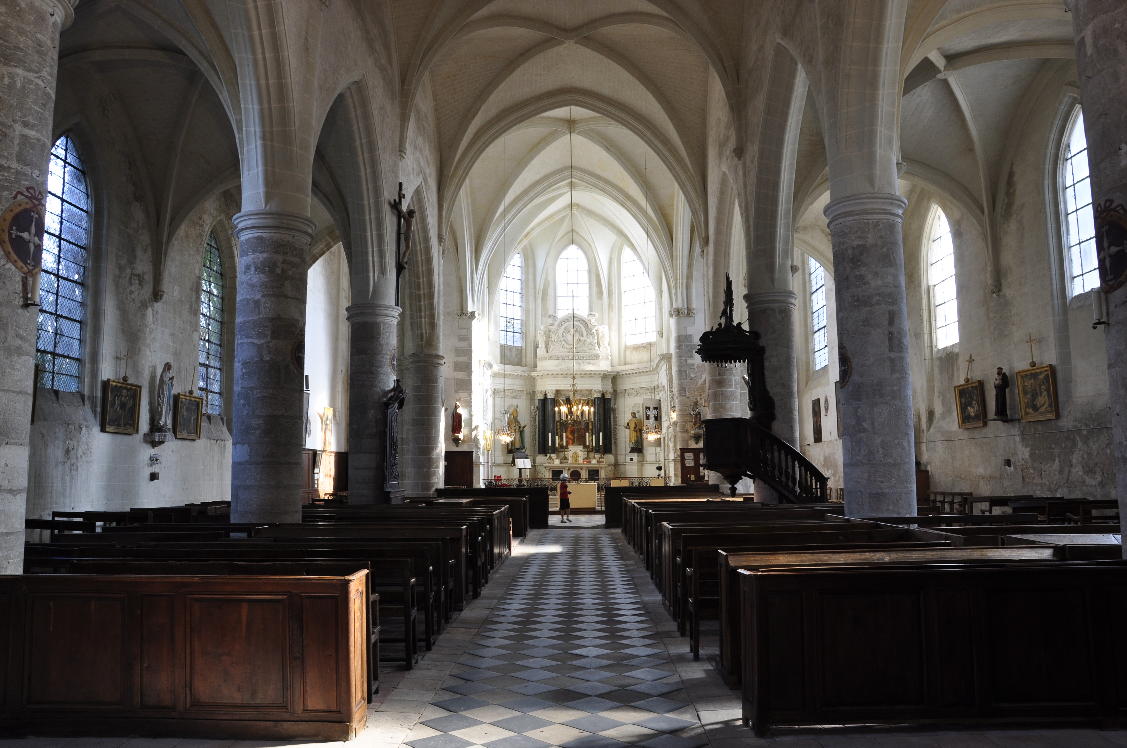 Église de Saint-Dyé-sur-Loire, vue de l'intérieur (France, Loir-et-Cher) .